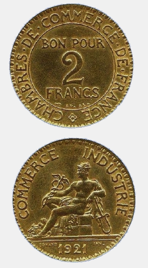 2 francs émis en 1922 (bon pour) Avers et Revers - Cupro-Nickel Scan personnel de la pièce